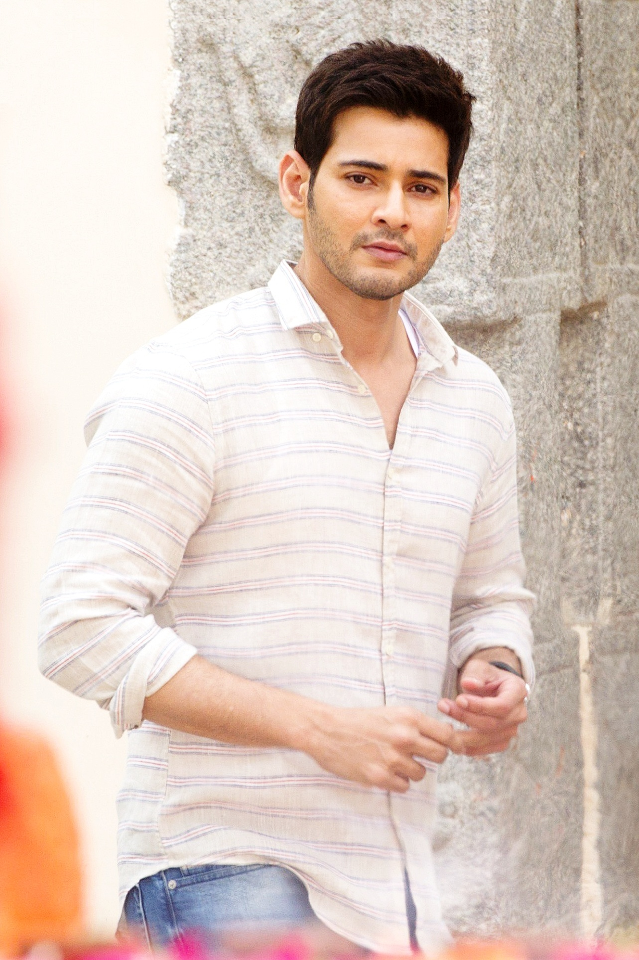 Mahesh Babu in Spyder